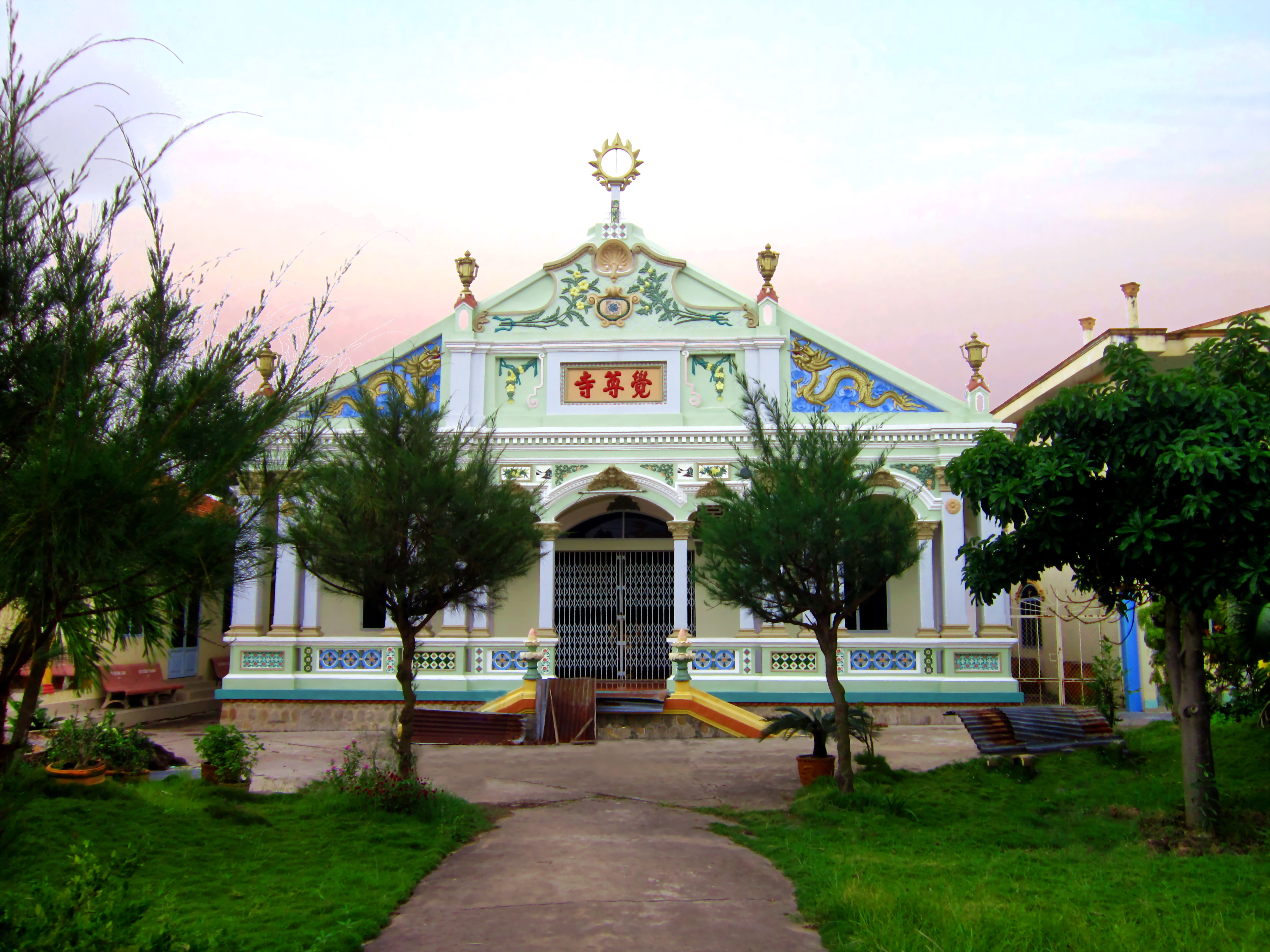 Chùa Giác Tôn ở xã Tân Bình, huyện Châu Thành, tỉnh Đồng Tháp, Việt Nam.